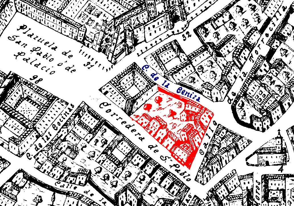 Plano de Ventura Seco sobre la ciudad de Valladolid, España. Sección que señala la ubicación de la Casa Revilla en la calle de la Torrecilla.